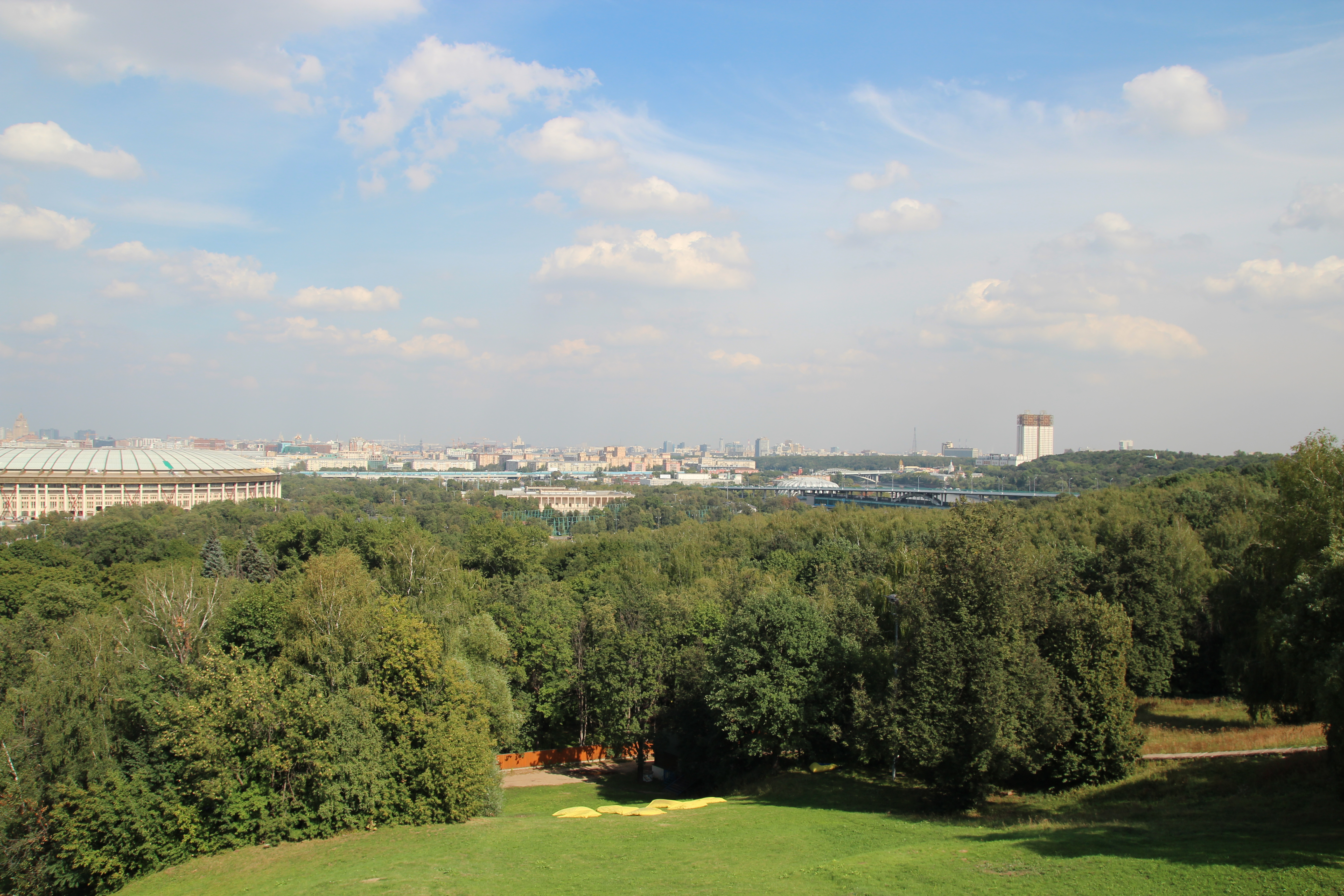 Парк МГУ им. М.В.Ломоносова на Воробьевых горах (160.0 га): нет данных БТИ, Раменки, Западный округ, Москва